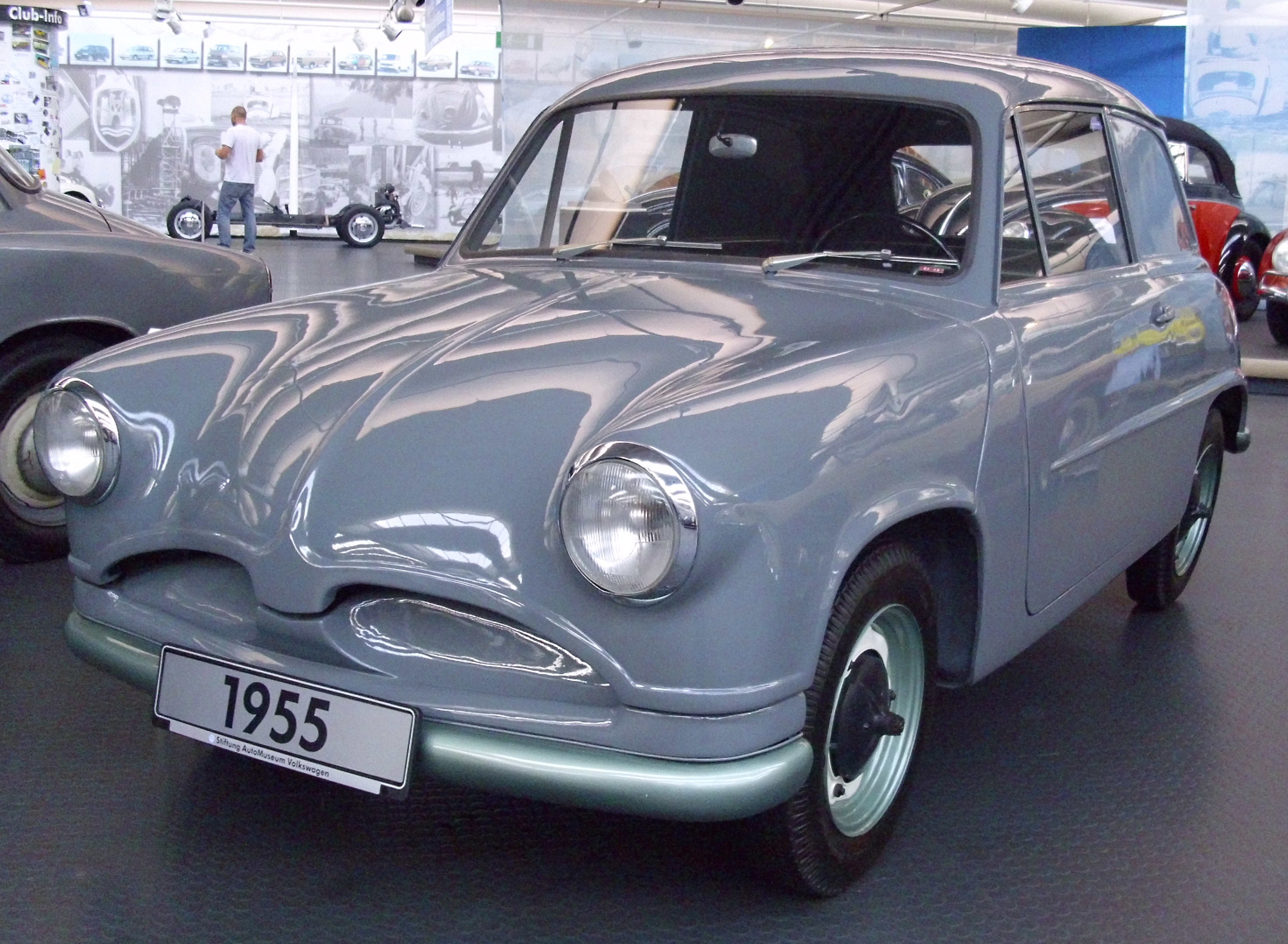 VW EA 48 Prototyp von 1955 im Automuseum Volkswagen in Wolfsburg, Deutschland.